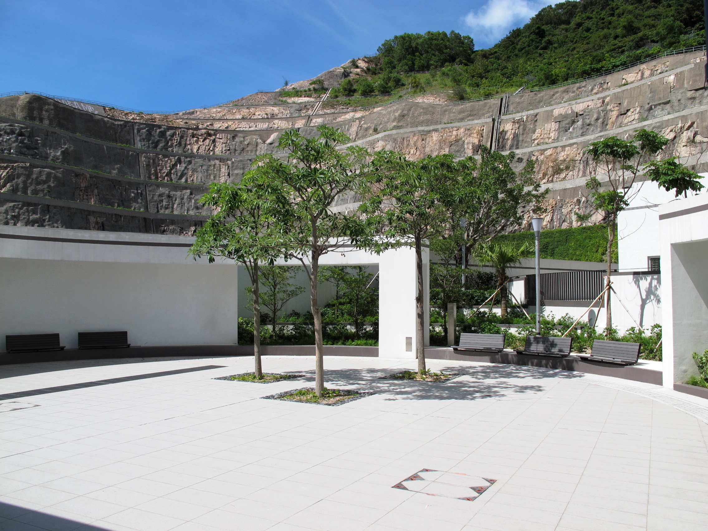 Choi Fook Estate 彩福邨